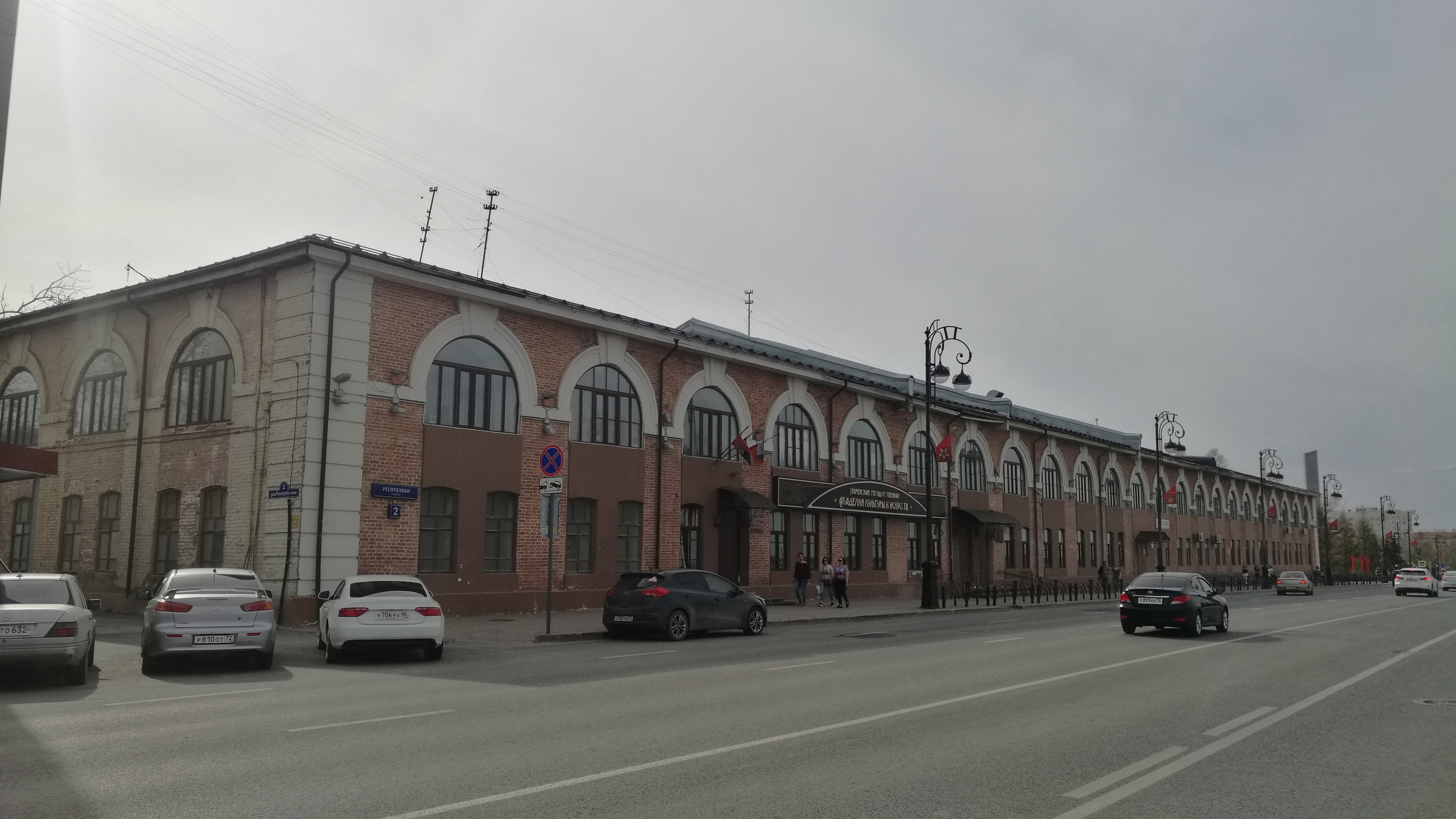 Gastokorto. Tjumeno, Rusio.